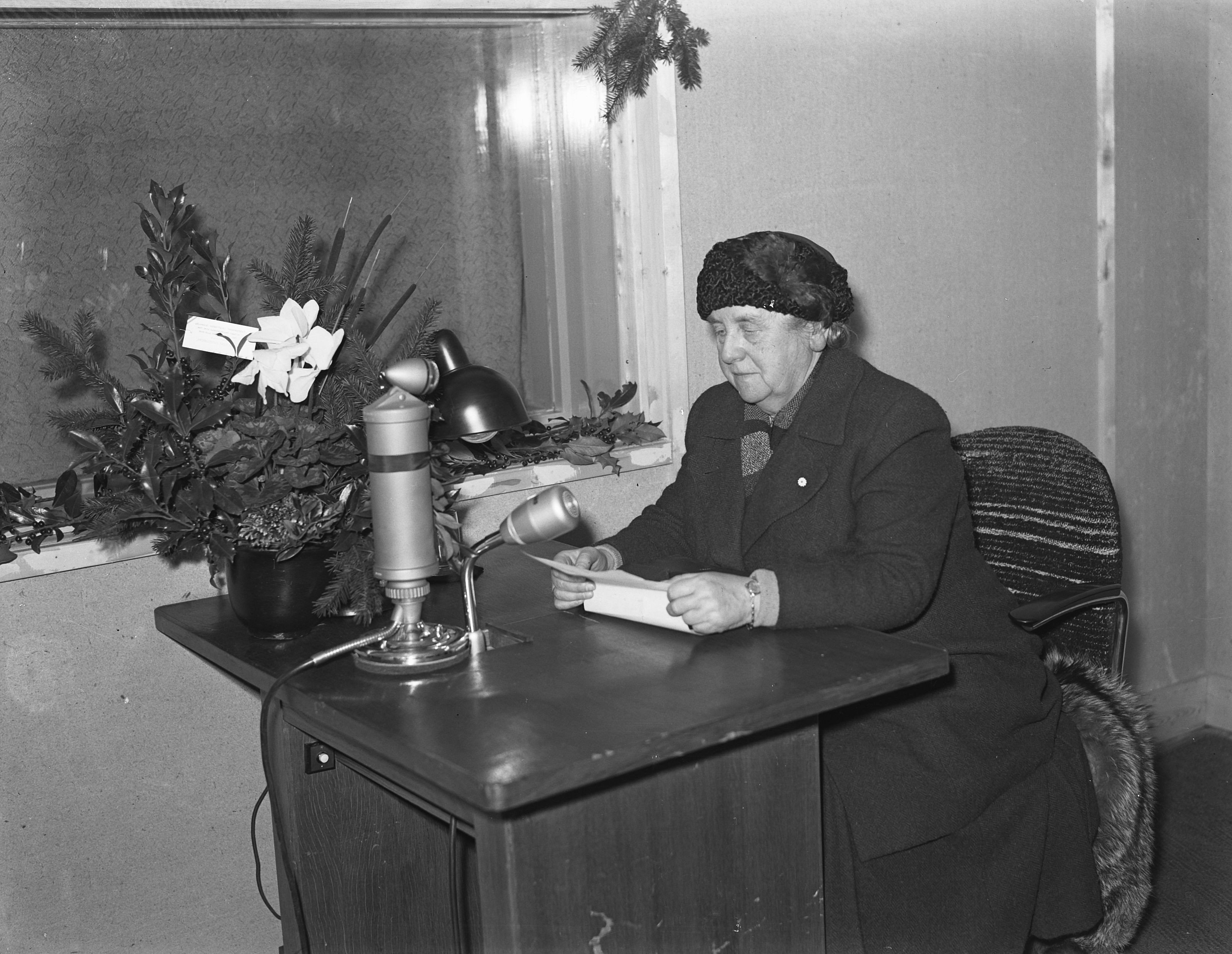 Collectie / Archief : Fotocollectie Anefo Reportage / Serie : [ onbekend ] Beschrijving : Koningin Wilhelmina geeft een radiorede voor de microfoon van herrijzend Nederland. Datum : 22 december 1945 Locatie : Nederland Trefwoorden : koningin, microfoon, radiorede Persoonsnaam : Wilhelmina, prinses Fotograaf : Meijer, […] / Anefo Auteursrechthebbende : Nationaal Archief Materiaalsoort : Glasnegatief Nummer archiefinventaris : bekijk toegang 2.24.01.09 Bestanddeelnummer : 901-2816 Reacties Geplaatst door Geschiedenismens op 21 september 2016 - 10:15. Kerstboodschap NB. Mogelijk vanuit de studio van radio 'Herrijzend Nederland' aan de Wassenaarscheweg te Den Haag